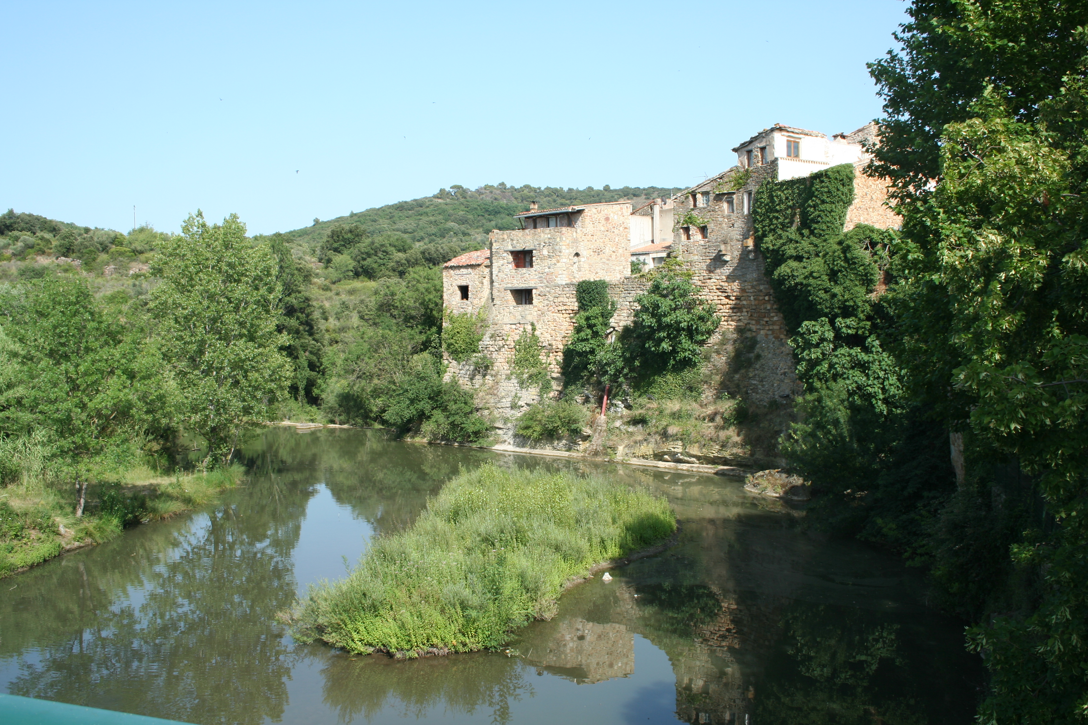 Gabian (Hérault) - la Thongue et remparts.